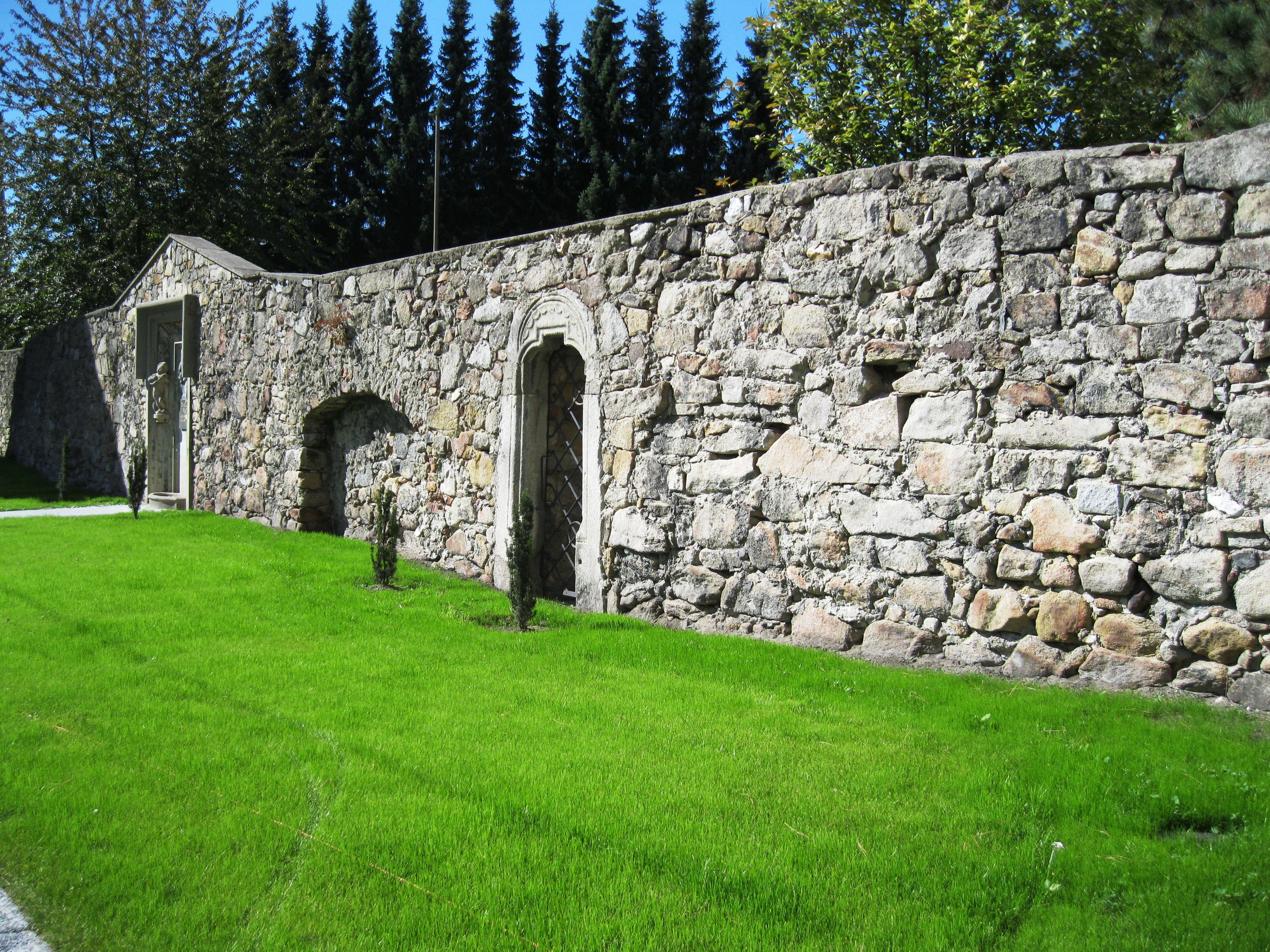 Městské opevnění (Vidnava), Školní, Radniční, Klášterní, Vidnava